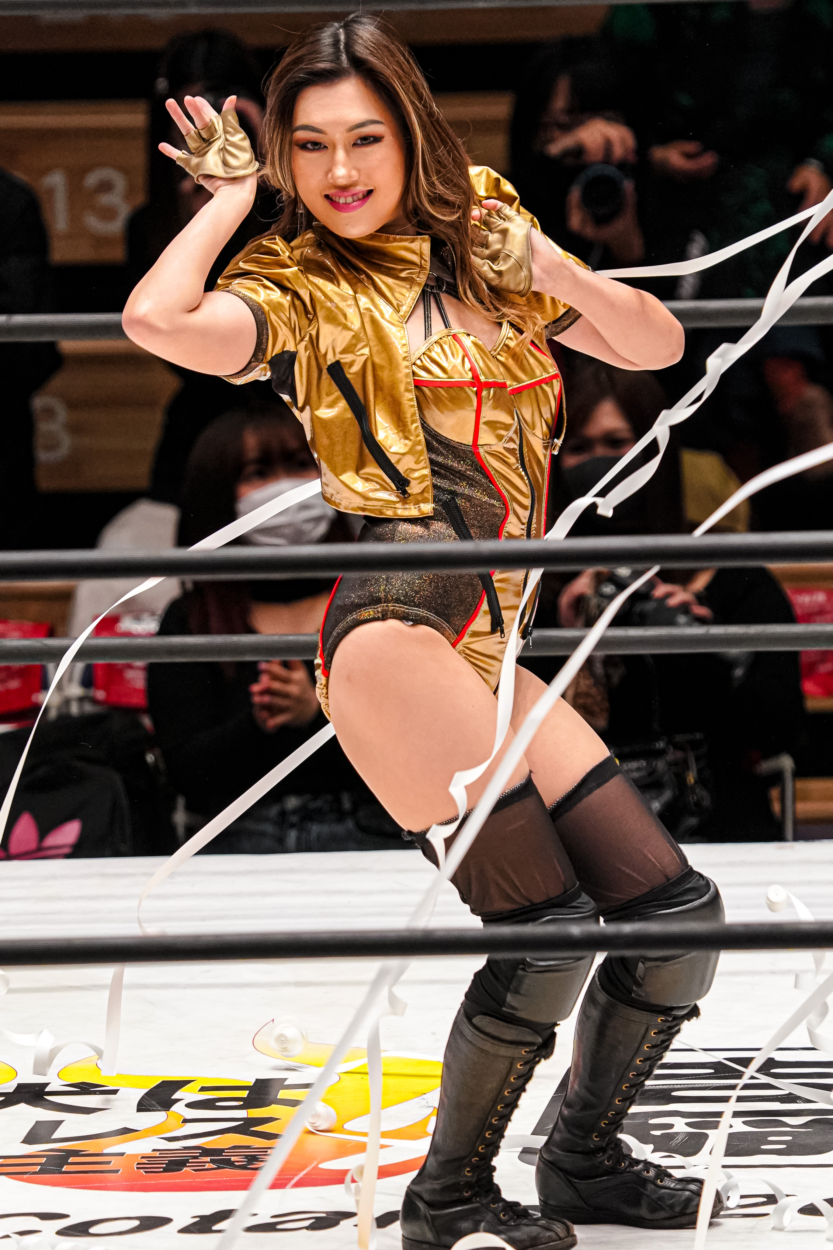 2020.03.18 後楽園ホール